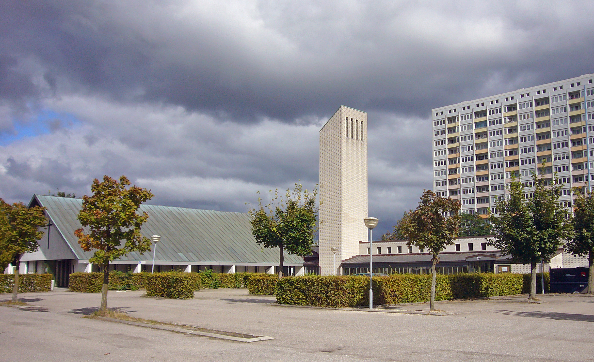 Nygårdskirken, Brøndby, Denmark. Nygårdskirken